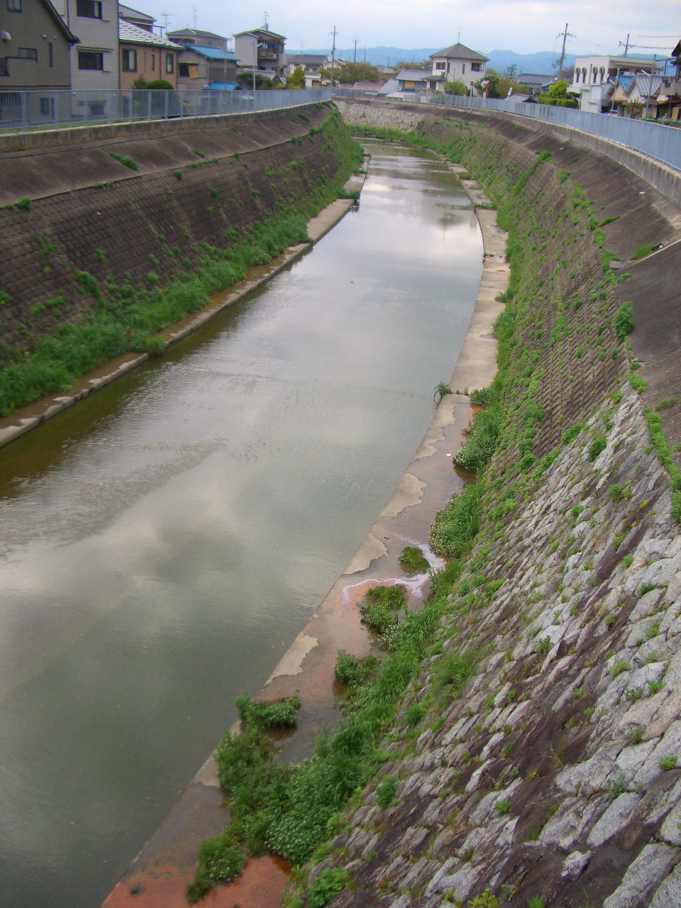 山田川 yamada River